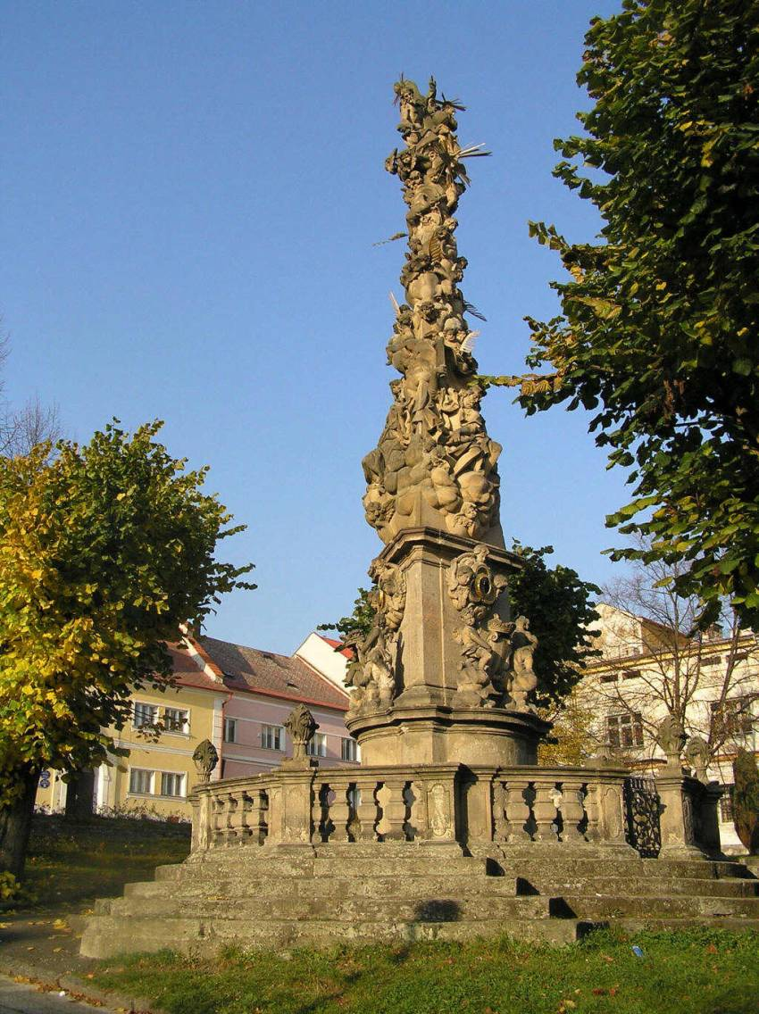 Sloup nejsvětější trojice ve Žluticích